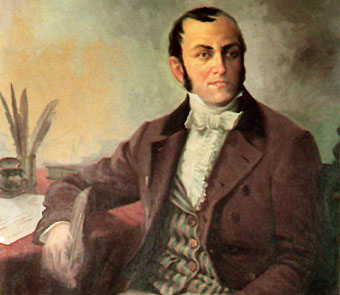 Retrato de José María España